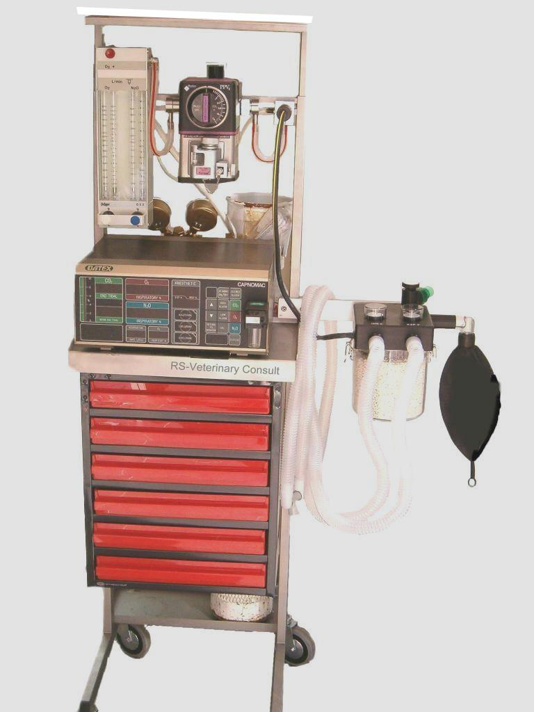 Anesthesietoestel RS-2 met cirkelabsorber, flowmeters en Isofluraan-verdamper (ontwerp RSchiedon).